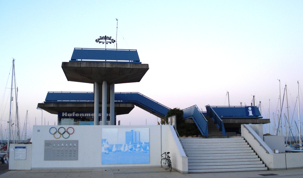 Hafenmeisterei im Olympiazentrum Kiel-Schilksee